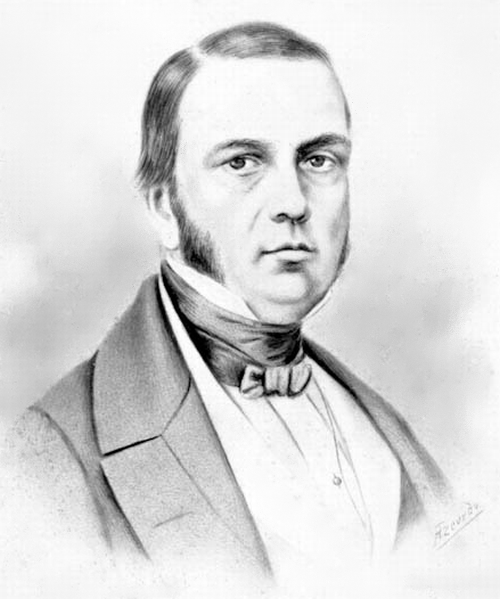 Antônio Peregrino Maciel Monteiro, 2º Barão de Itamaracá